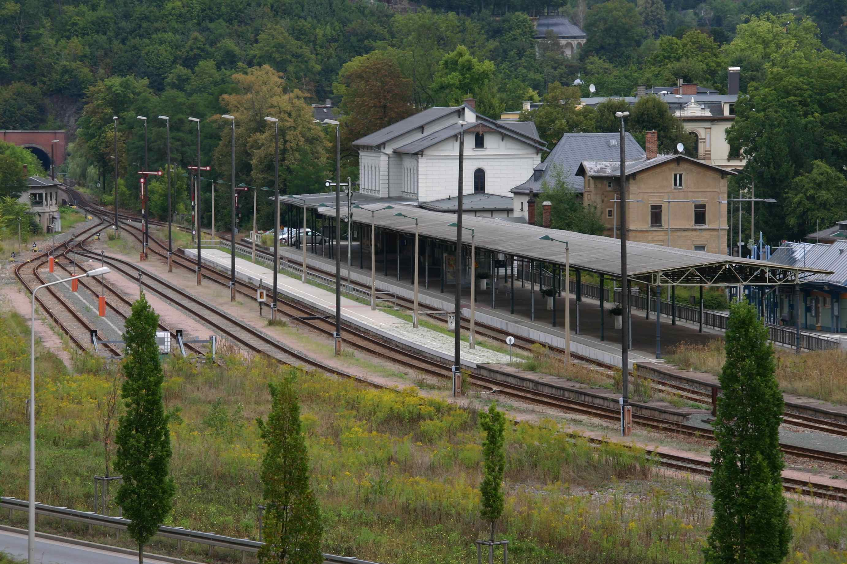 Bahnhof Greiz 2012